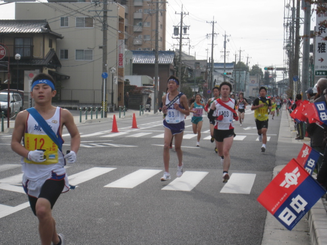 岡崎市民駅伝競走大会